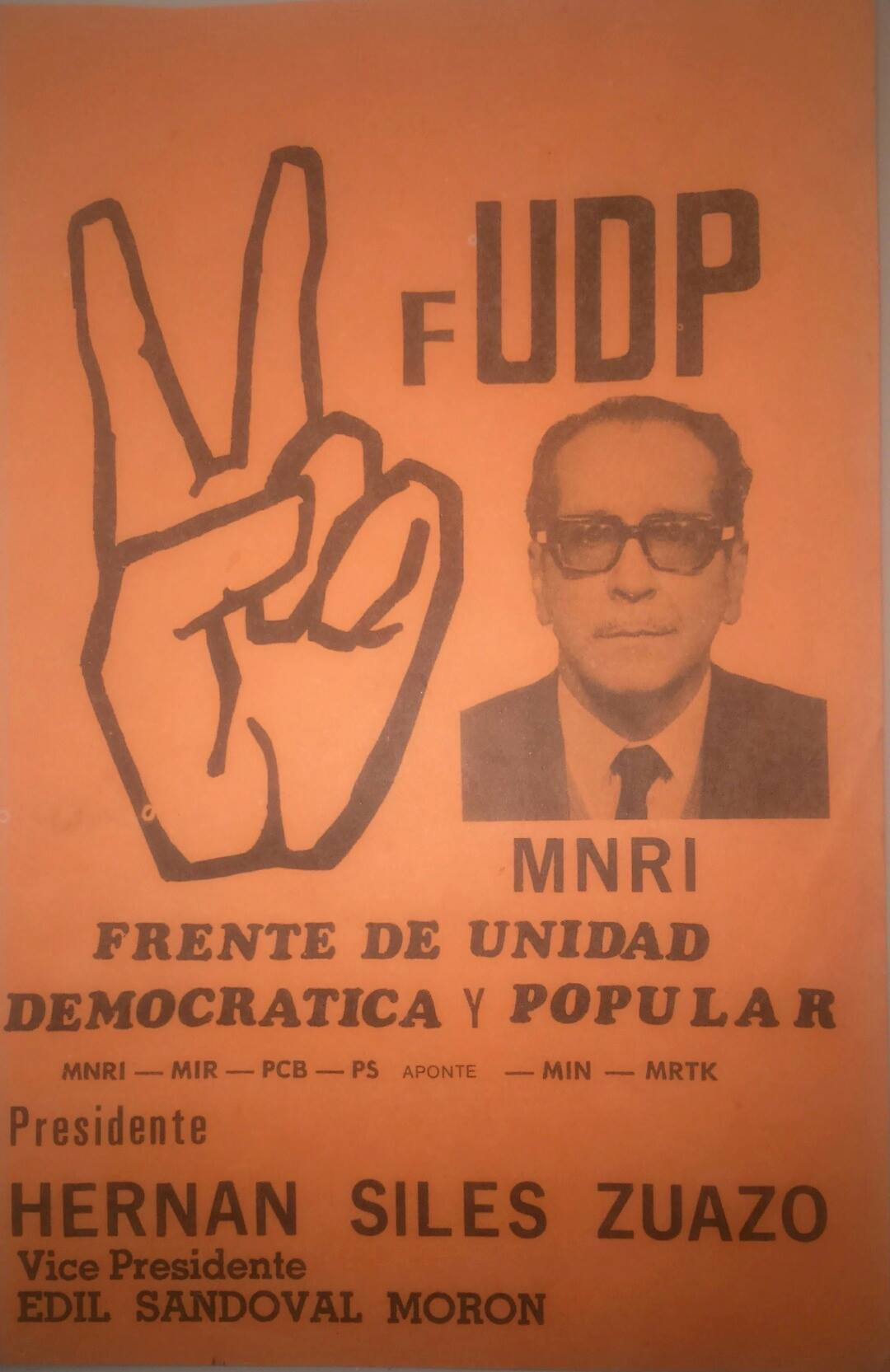 Boleta de sufragio, elecciones nacionales de Bolivia 1978